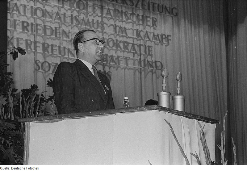 Original image description from the Deutsche Fotothek Der Chefredakteur der Leipziger Volkszeitung Kurt Hanke am Rednerpult bei der Festivität zum 60jährigen Bestehen der Leipziger Volkszeitung